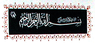 Moschee Wesseling, Mimar–Sinan-Camii